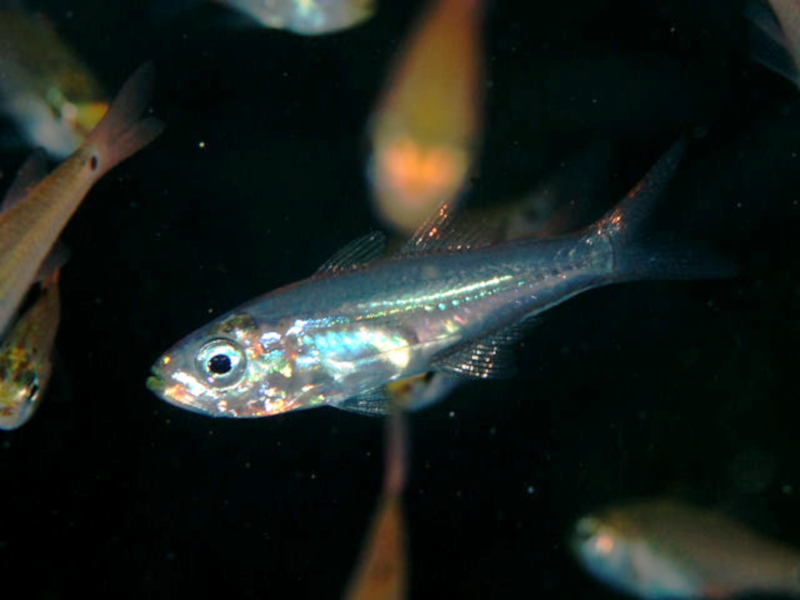 スカシテンジクダイ Rhabdamia gracilis